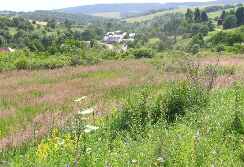 Celkový pohľad